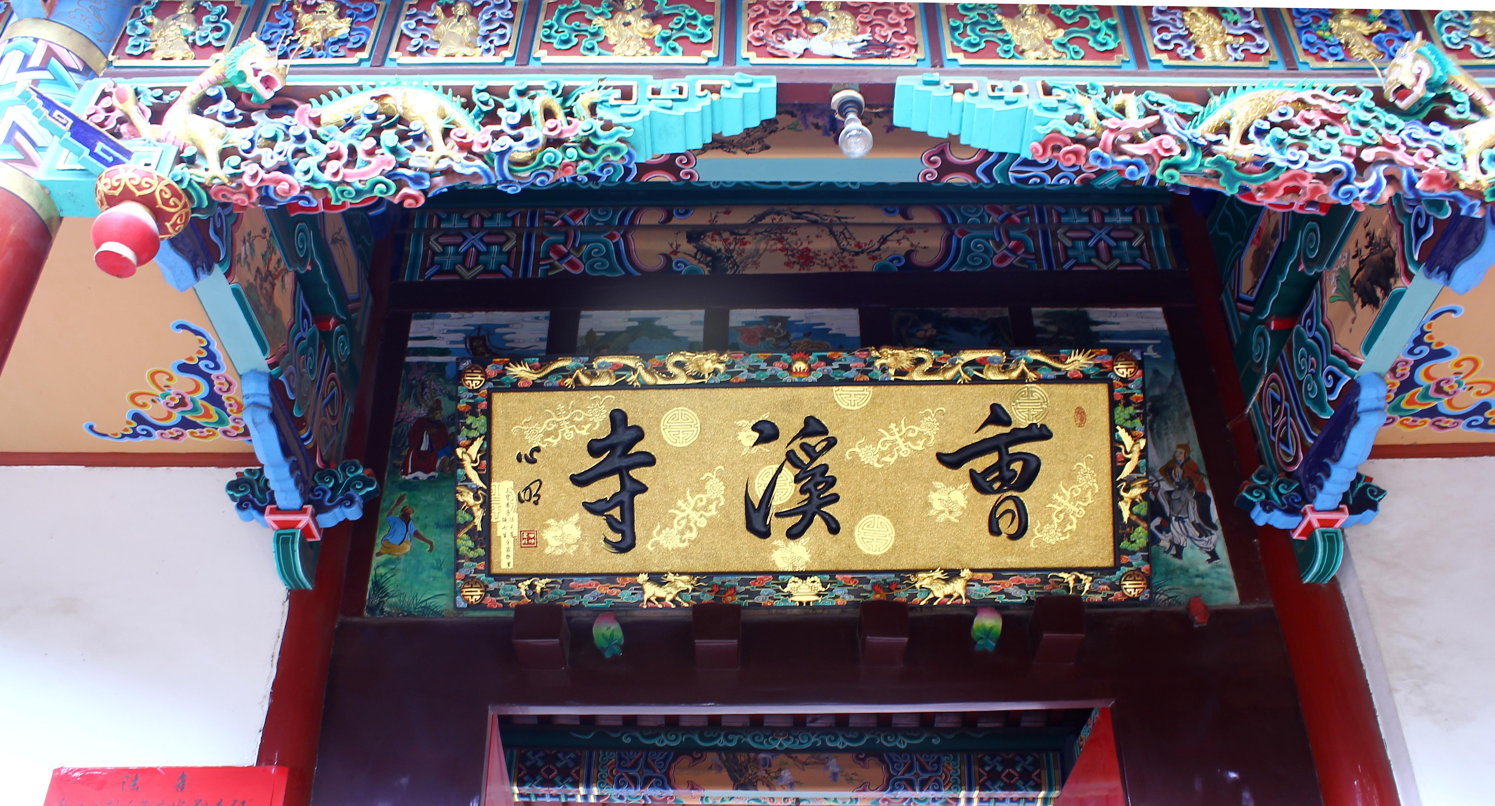 安宁曹溪寺的匾额